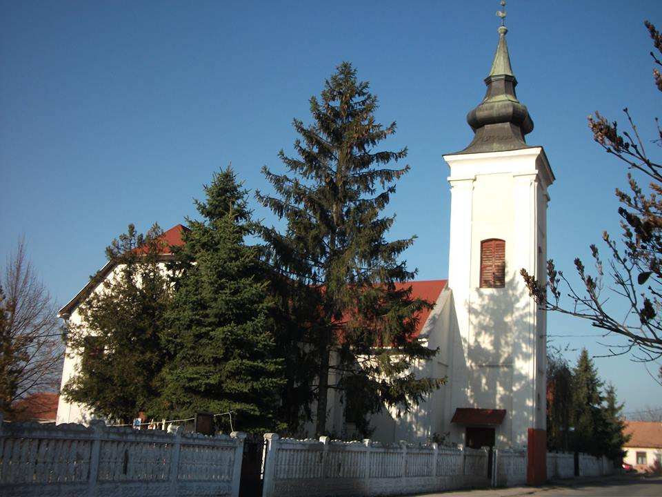 Miskolc-Szirma Református templom